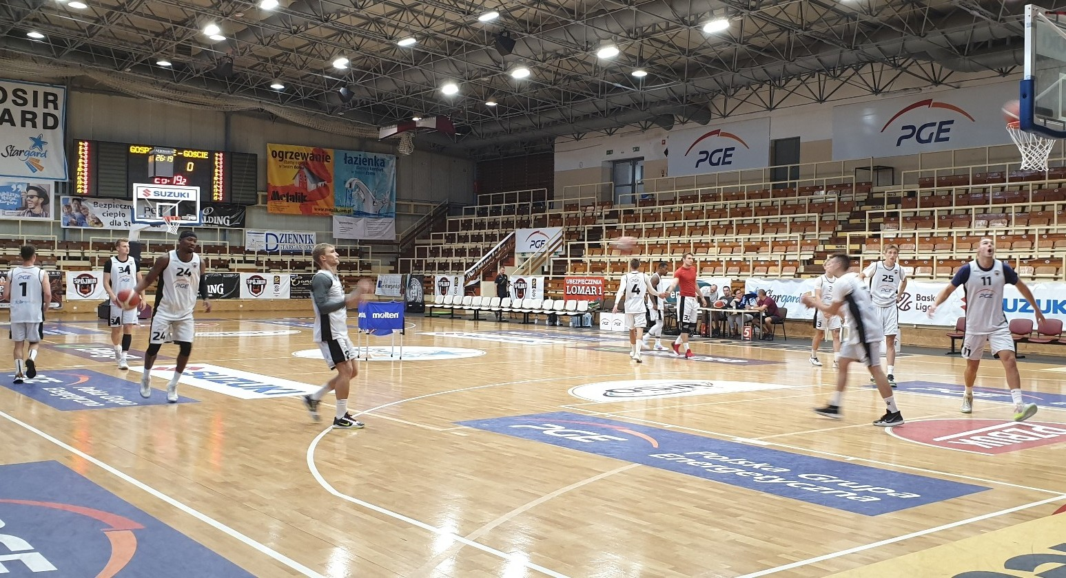 Stargard, 08.08.2020. Sparing PGE Spójni odwołany